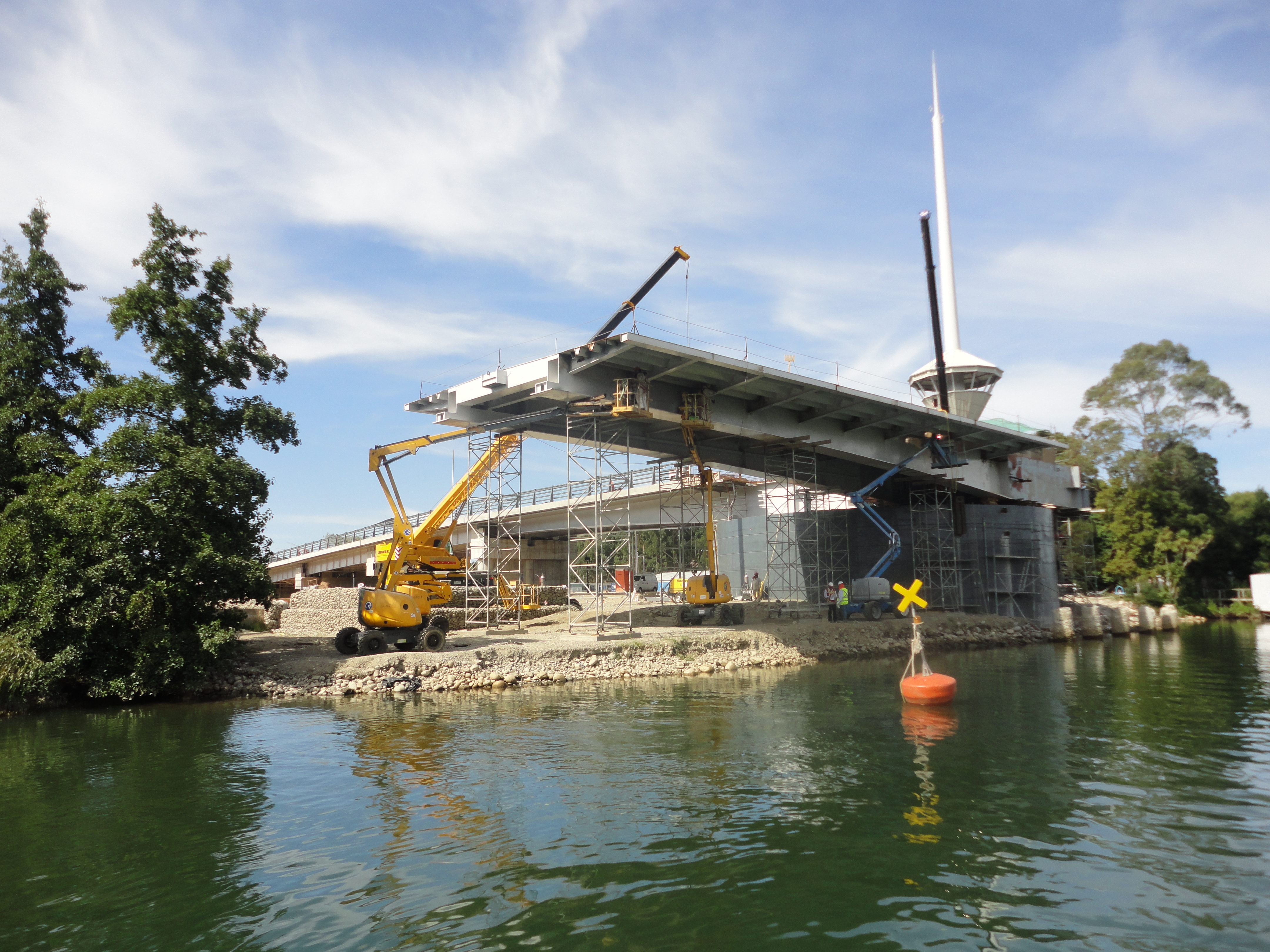 Imagen del Puente Cau-Cau en construcción durante febrero de 2014.